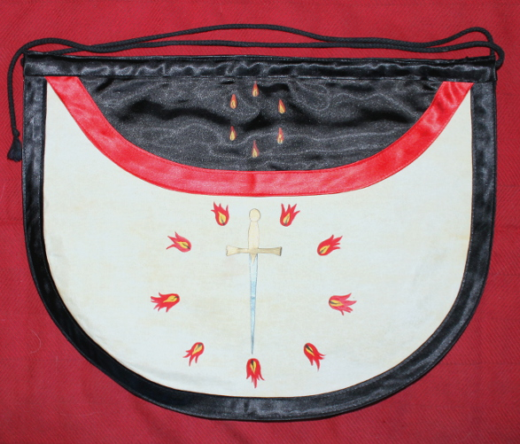 Tablier peint sur soie du 1er du Rite français moderne